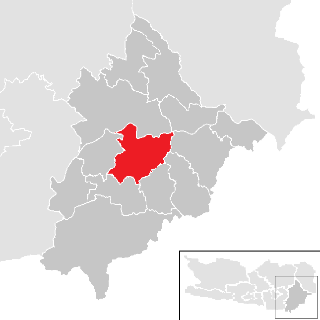 Bezirk Völkermarkt